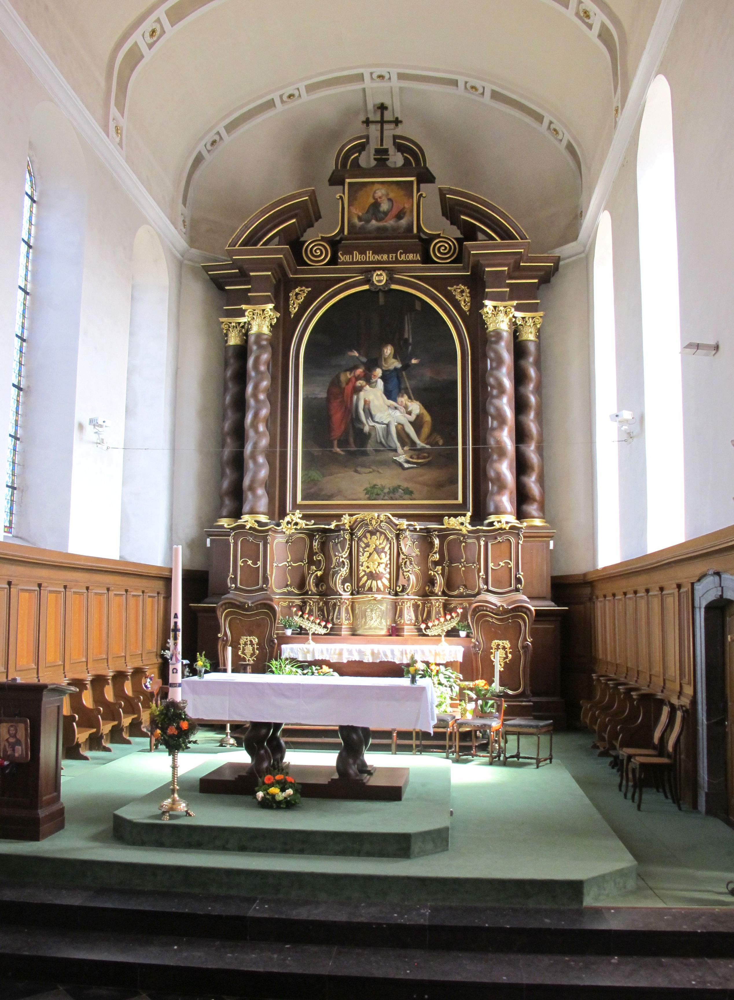 Choeur et autel église Saint Nicolas, Stembert Belgique